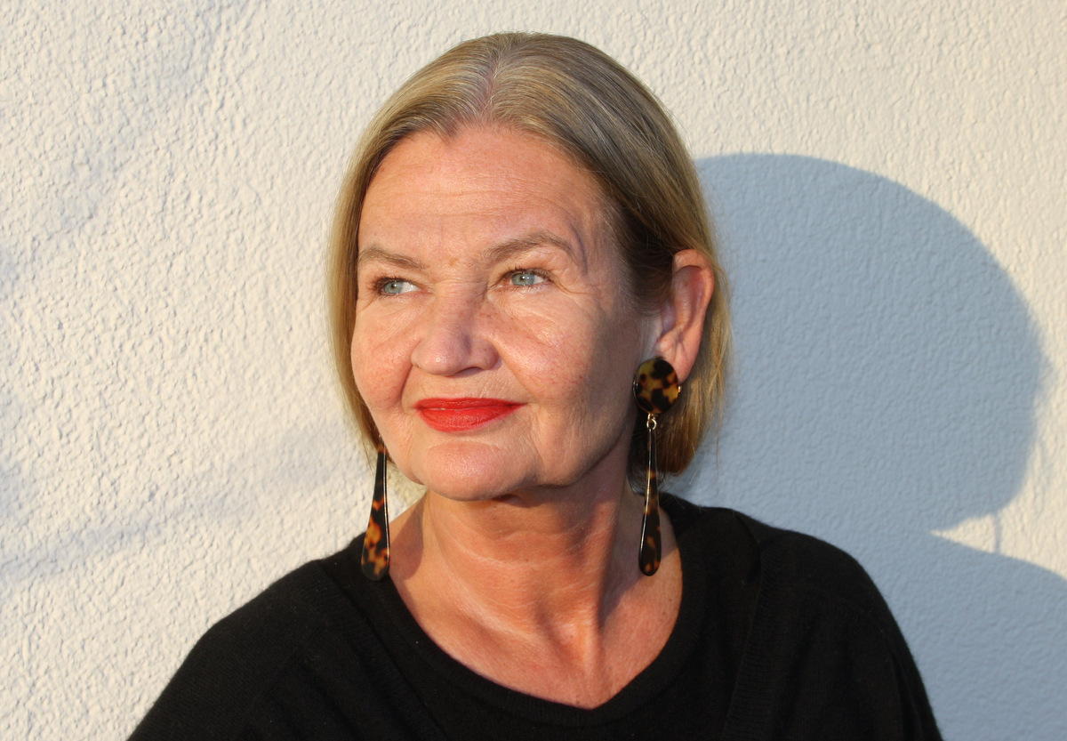 Deutsche Theaterregisseurin, geboren 30.04.1954